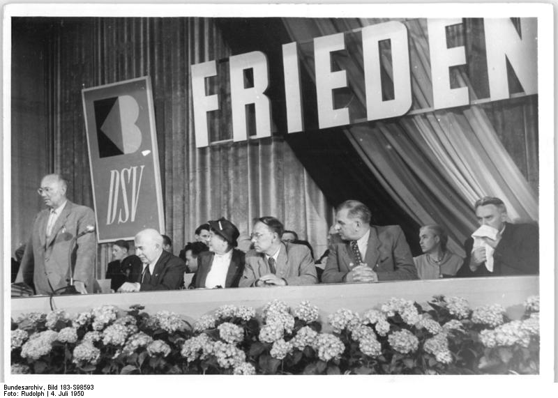 Illus-Rudolph 4.7.50 Deutscher Schriftsteller-Kongreß in Berlin. Vom 4.-6.7.50 findet in Berlin anläßlich des 5-jährigen Bestehens des Kulturbundes zur demokratischen Erneuerung Deutschlands ein deutscher Schriftsteller-Kongreß statt. Der Präsident des Kulturbundes Johannes R. Becher begrüßte die zahlreichen Gäste. Neben ihm sitzend der Dichter Arnold Zweig, die Schriftstellerin Maria Majerowa aus der Tschechoslowakei, die sowjetischen Schriftsteller Pawlenko und Leonidse. 7100-50